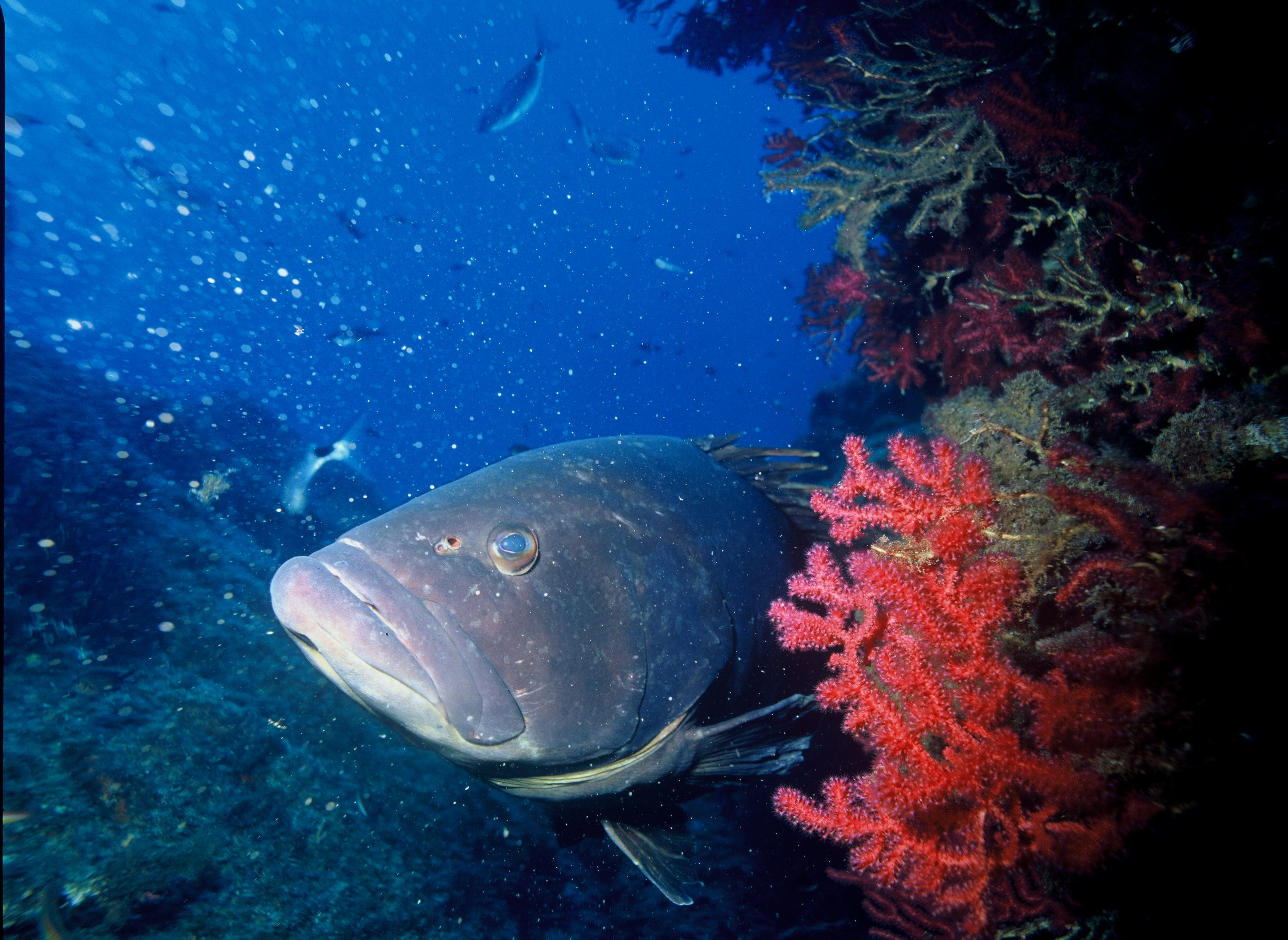 grouper/gorgone